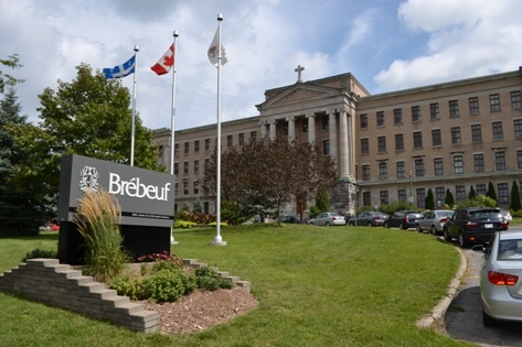 Collège Jean-de-Brébeuf, 3200, chemin de la Côte-Ste-Catherine, Montréal, Québec